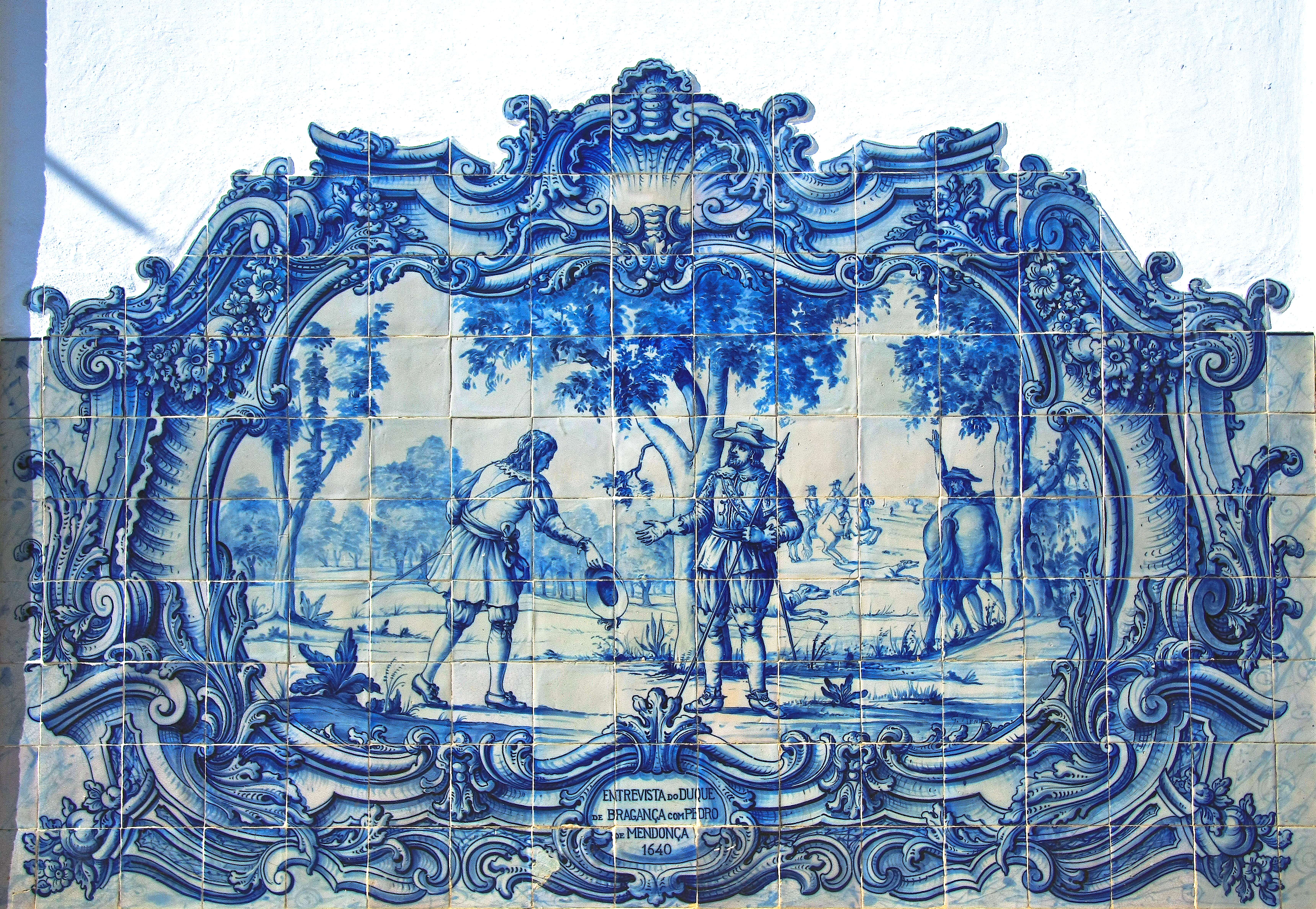 O Museu do Mármore, instalado na antiga estação ferroviária de Vila Viçosa, edifício datado do início do século XX, constitui um dos mais importantes agentes culturais do contexto alentejano, na medida em que congrega elementos vitais para um conhecimento adequado do concelho de Vila Viçosa. O objectivo da exposição permanente, patente no museu, consiste na percepção destas mensagens, por meio da recolha e preservação de elementos de índole cultural, etnográfica e artística, de carácter local e regional, através da reprodução de alguns dos principais espaços e cenários das actividades de extracção e transformação do mármore, da recriação de ambientes de trabalho e da divulgação de elementos culturais Os objectivos do museu baseiam-se igualmente na criação e fortalecimento de relações e parcerias mantidas entre as diversas instituições que contribuem para a consolidação desta ideia, nomeadamente as empresas, as associações locais e os escultores. Promover e divulgar o mármore, criar um espaço vivo, didáctico e cultural relacionando os diferentes aspectos desta rocha metamórfica às suas múltiplas vertentes. See where this picture was taken. [?]